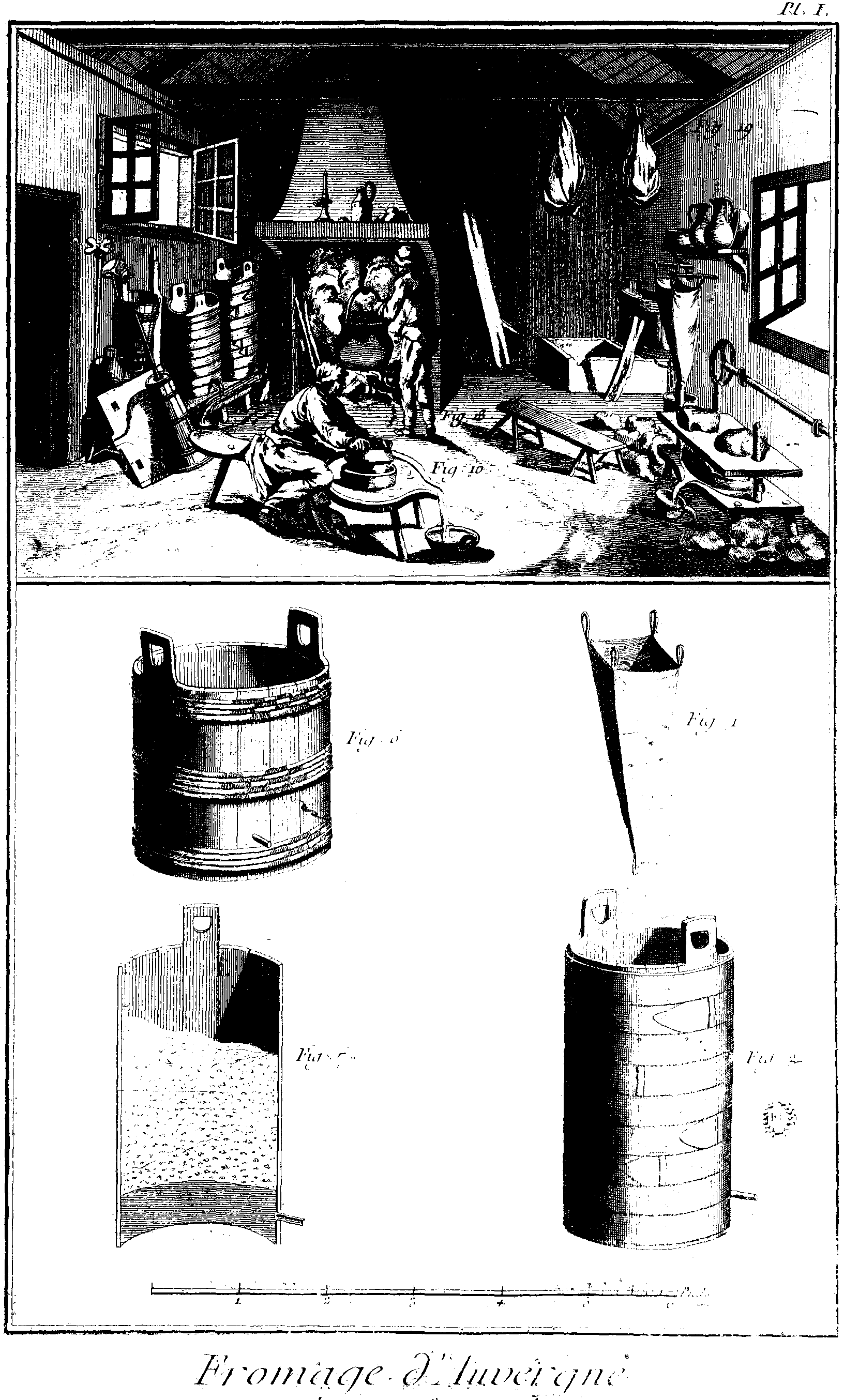 Planches de l'Encyclopédie de Diderot et d'Alembert, volume 5